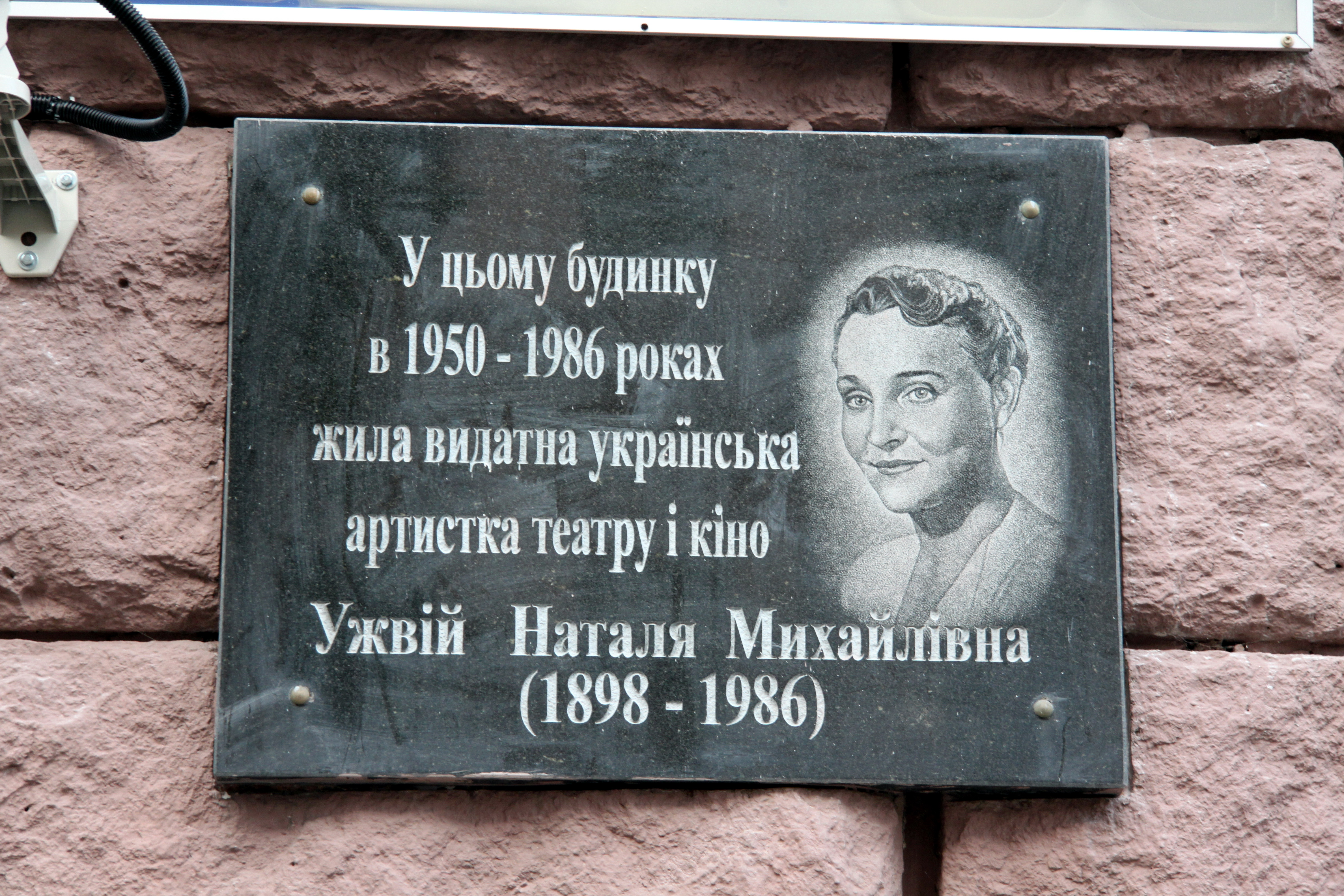 Будинок прибутковий, в якому мешкали актори: Ужвій Н. М., Пономаренко Є. П., Київ, Городецького Архітектора вул., 17/1